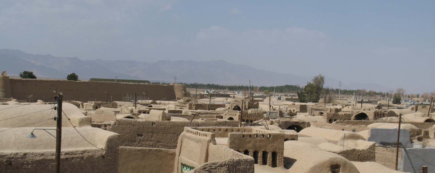 نمایی از اسفندآباد